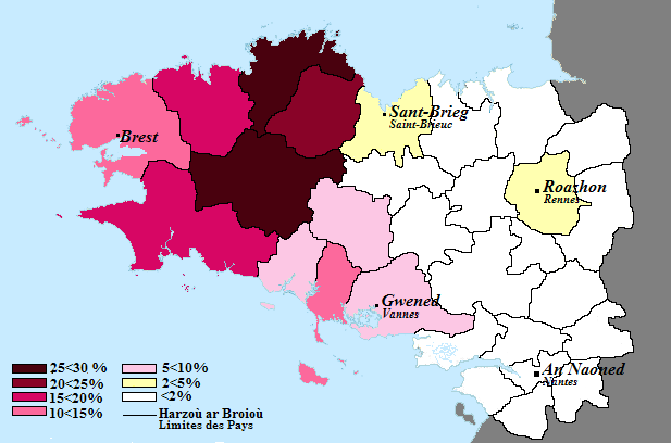 Niver Brezhonegrien dre c'hant e pep bro deus Breizh, diouzh an diagnostik war stad ar brezhoneg a zo bet savet e 2004